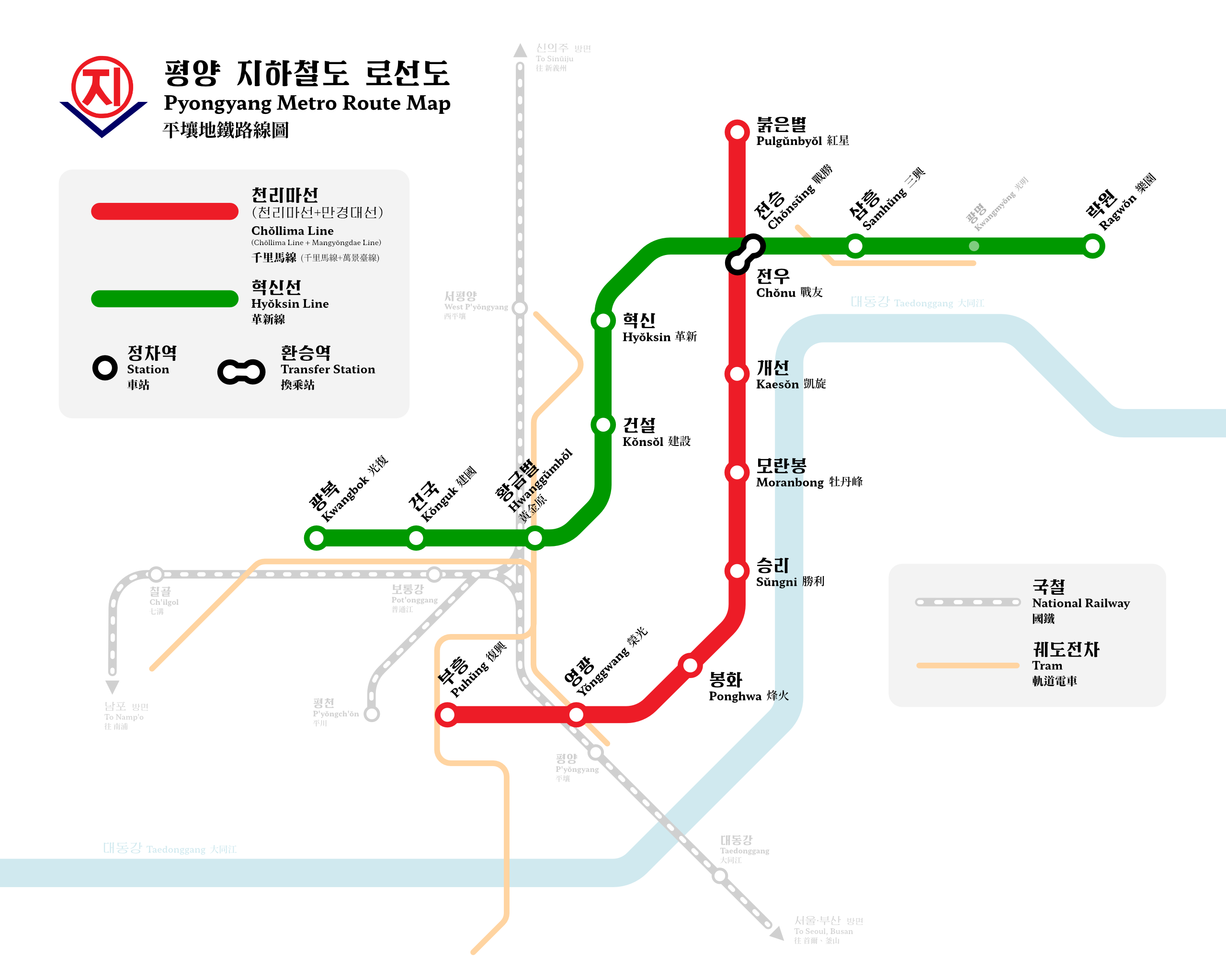 中文（台灣）: 平壤地鐵中文版。